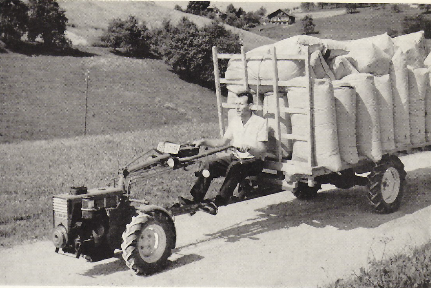 Aebi AM 30